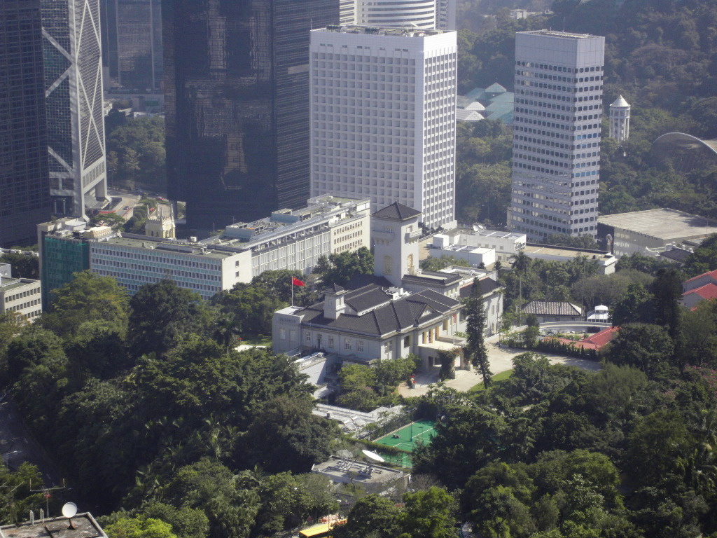 中文（香港）: 禮賓府烏瞰景